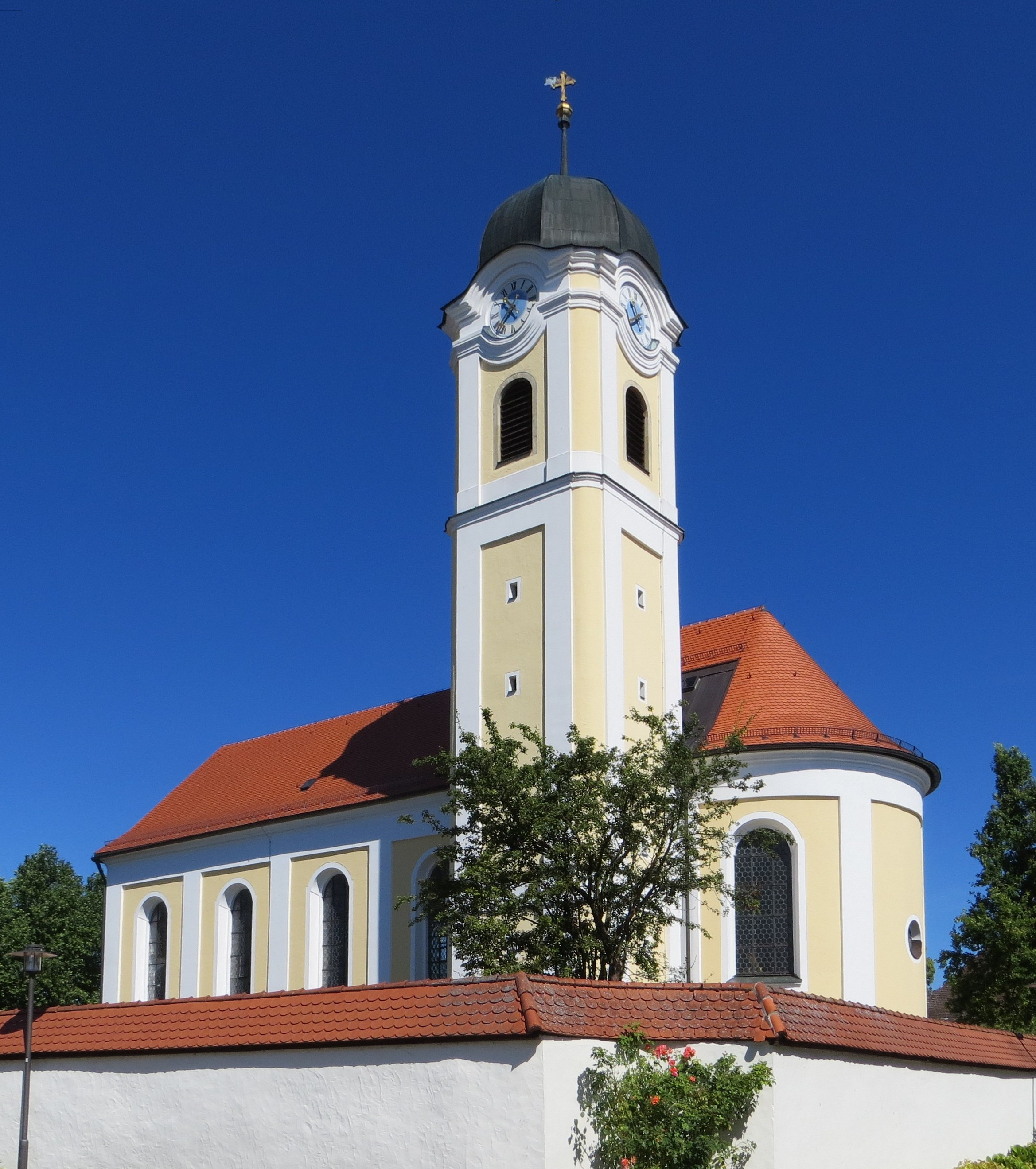 Mariä Heimsuchung - Hohenschambach